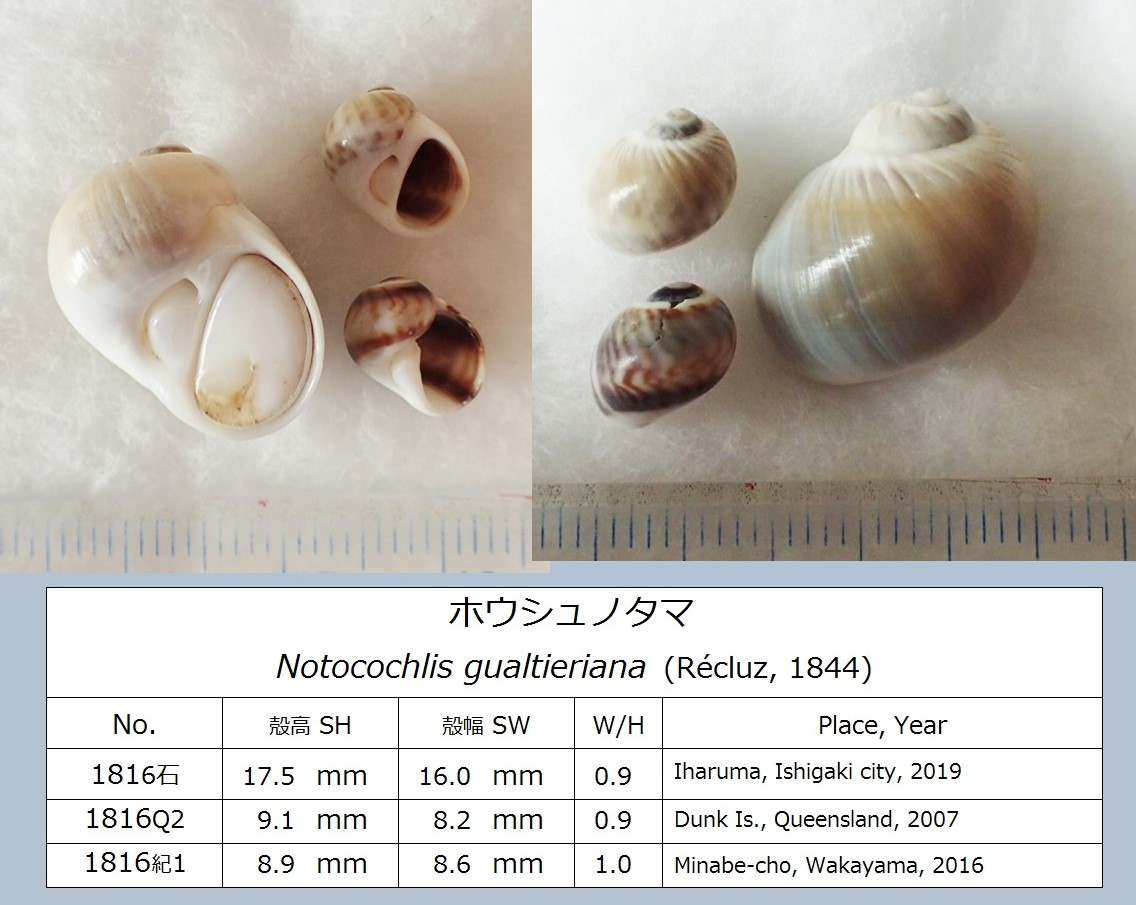 オーズトラリアのダンク島と、和歌山県みなべ町千里の浜でひろった貝殻。